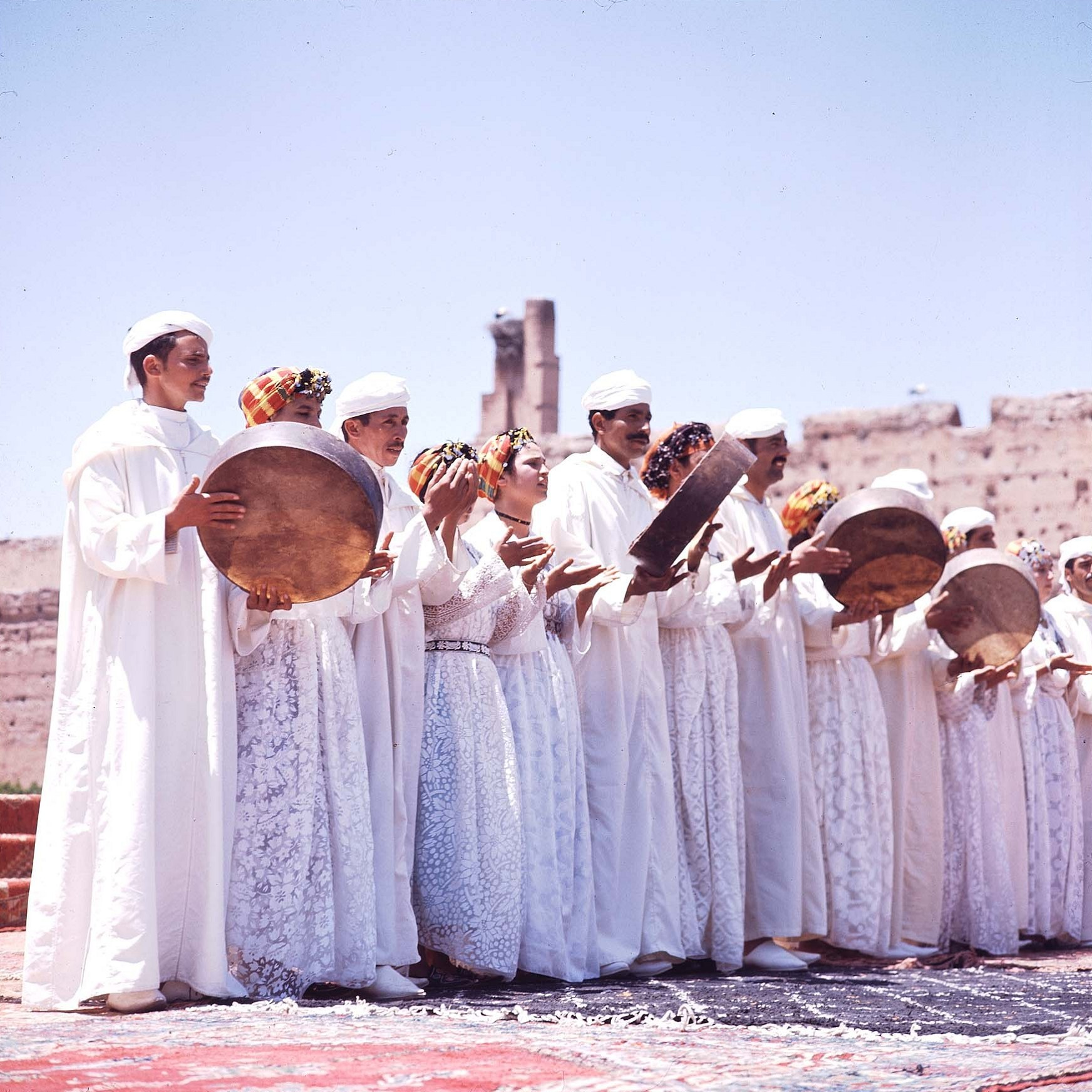 Ahidous dans uit de Midden Atlas, Marokko.